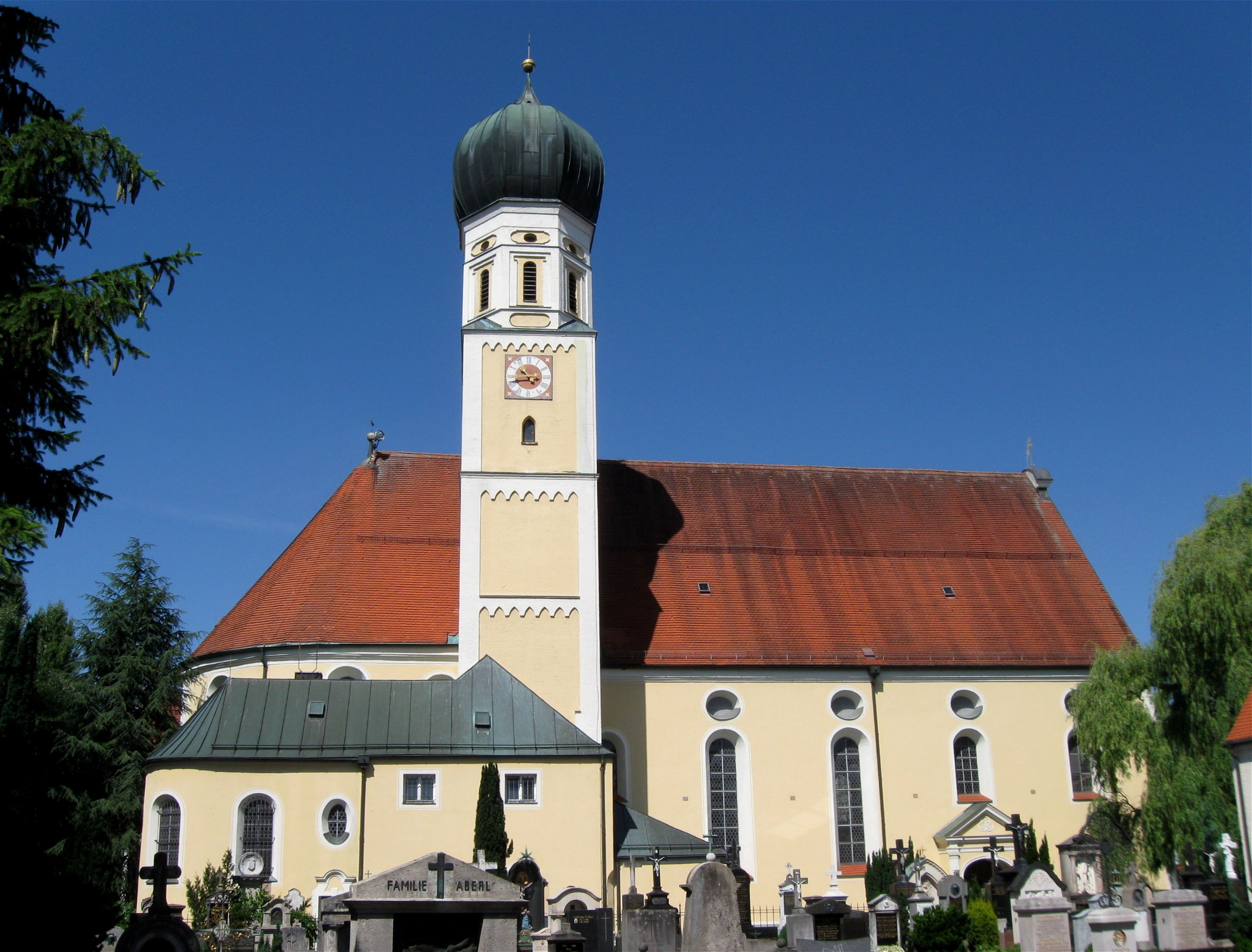 Kirchstraße 6. Kath. Stadtpfarrkirche St.Magdalena, barocker Wandpfeilerbau, Constantin Pader zugeschrieben, 1673; Friedhofsanlage mit Ummauerung; Grabdenkmal für Ferdinand von Miller, nach 1887, im Friedhof; mit Ausstattung.